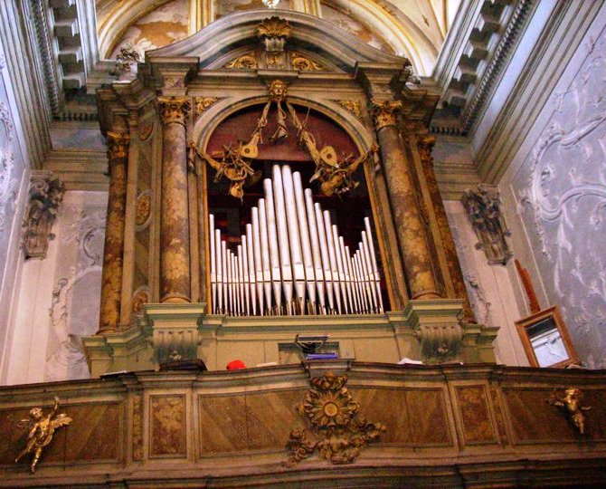 Organo Nacchini della chiesa di San Nicola da Tolentino, Venezia - Facciata veduta dal coro